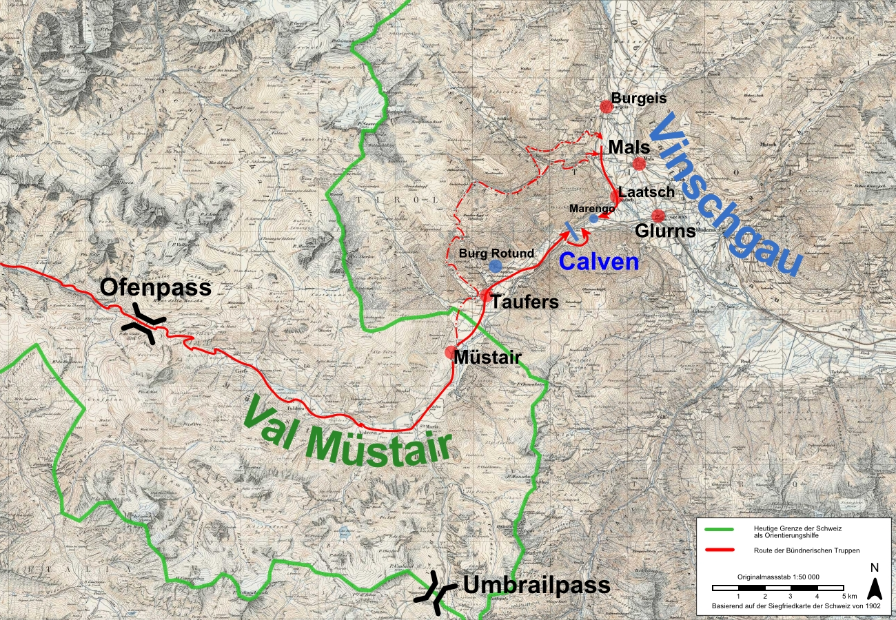 Version von Image:Map Calven.jpg mit Beschriftung in Deutsch. Die Karte zeigt die Situation der Schlacht an der Calven im Schwabenkrieg. Information über die Route der Bündner Truppen kommt von [1], der Kartenhintergrund stammt von der Siegfriedkarte der Schweiz von 1902. Bild zusammengesetzt aus den Kartenblättern 425, 425bis, 429 und 429bis.